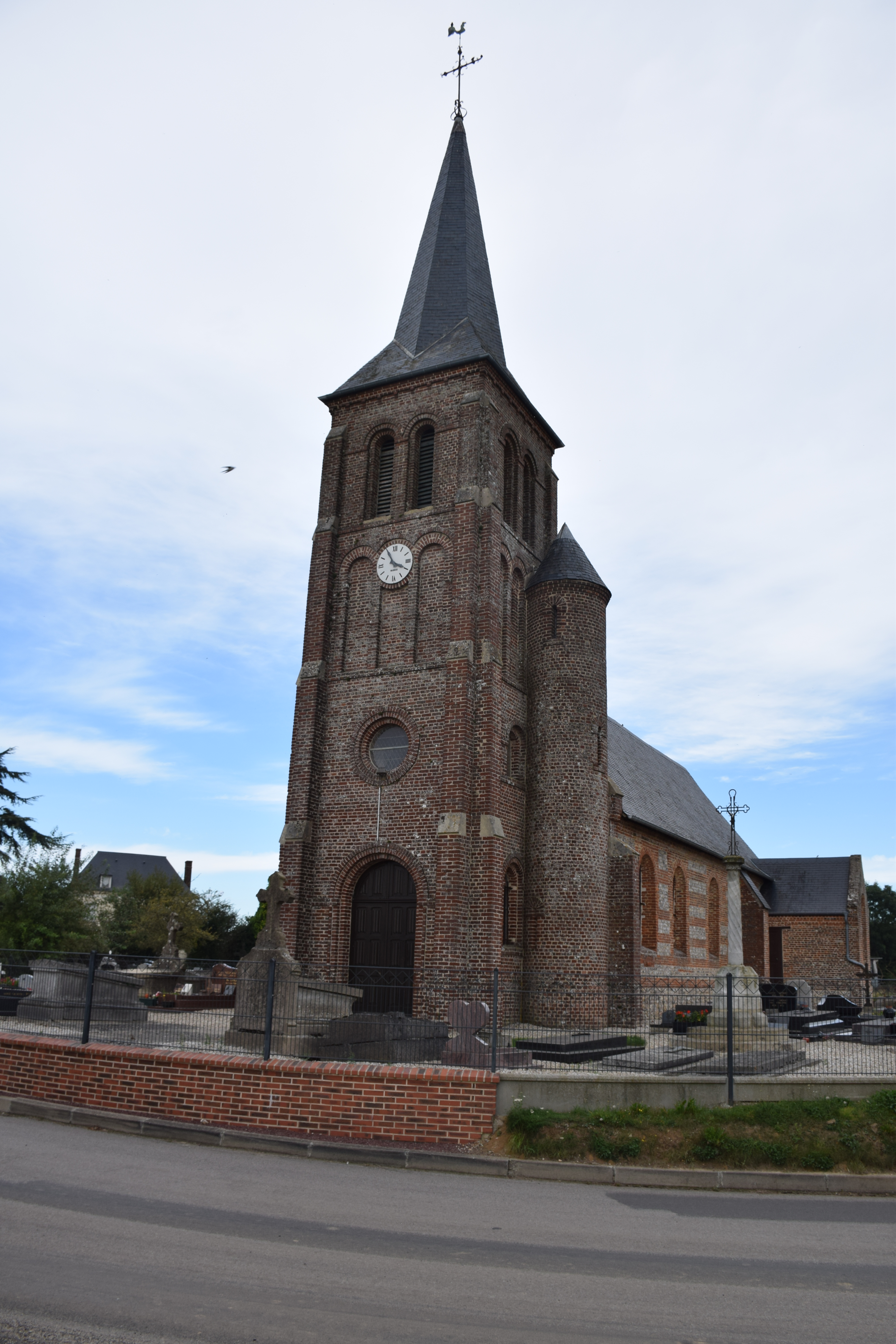 Eglise